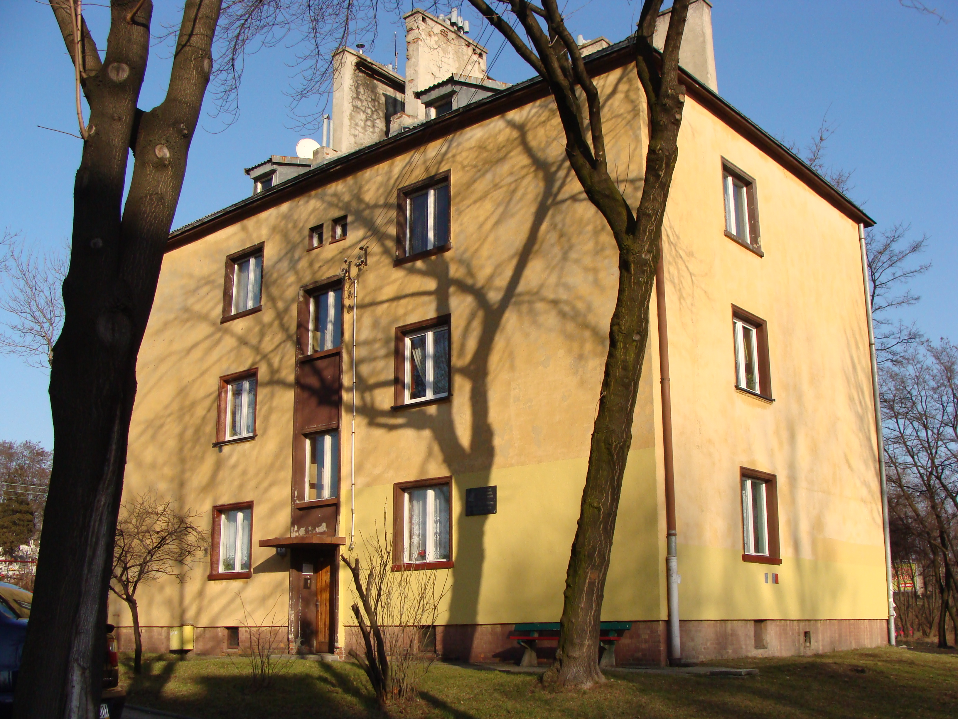 Osiedle Walcownia w Sosnowcu - dom w którym tworzył Marian Malina